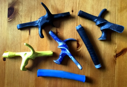 Casgliad o Garnau